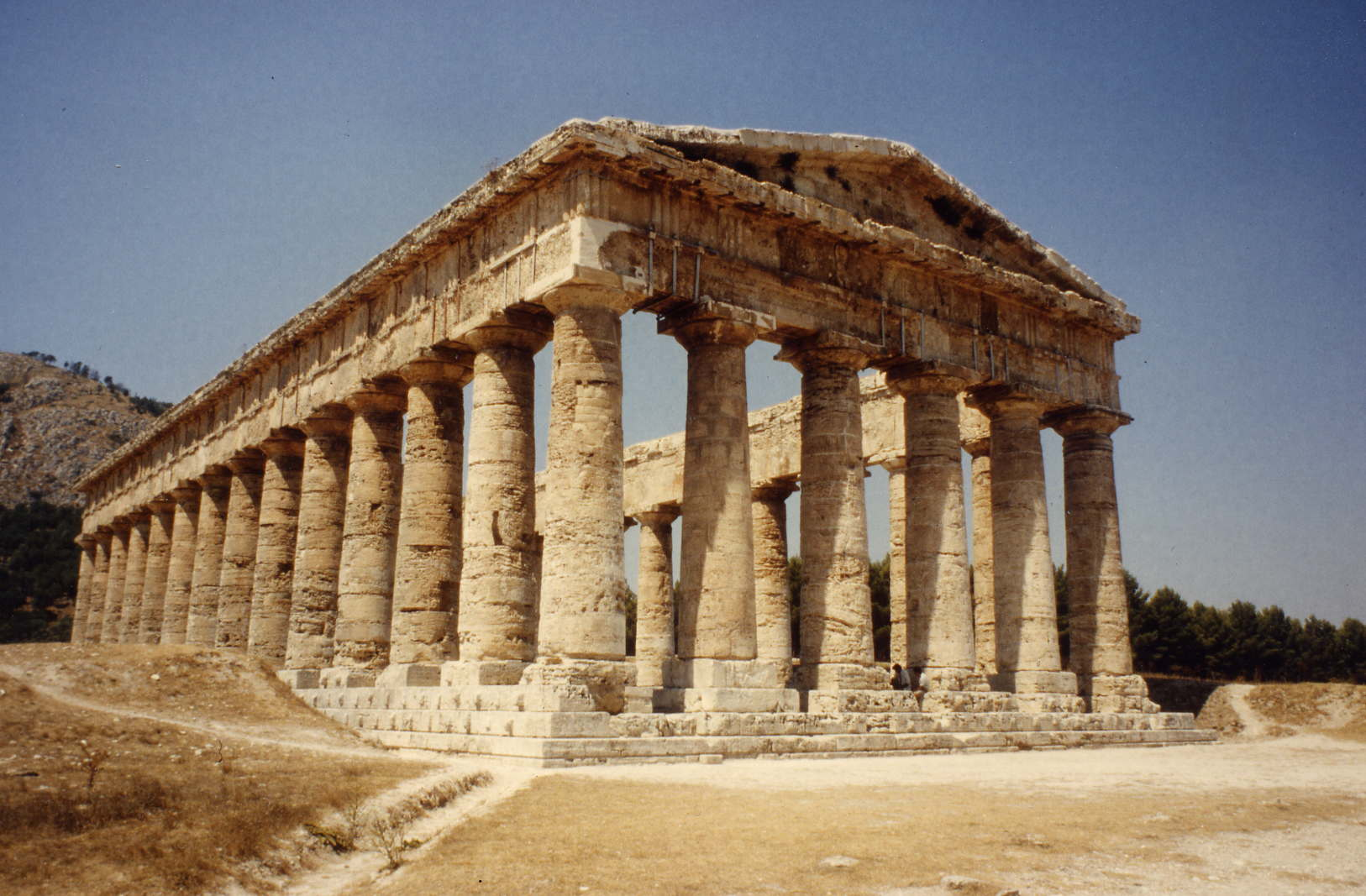 Le temple de Ségeste - image par Dingy, accordée avec licence Commons BY-SA. citez auteur merci